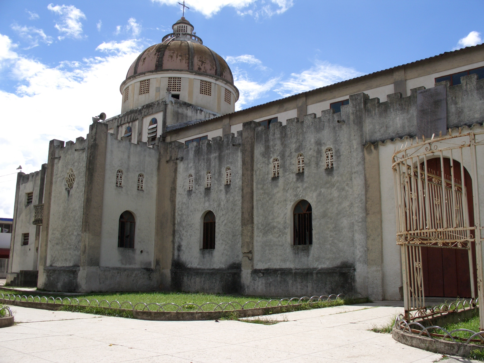 Iglesia en la población de Cariaco.